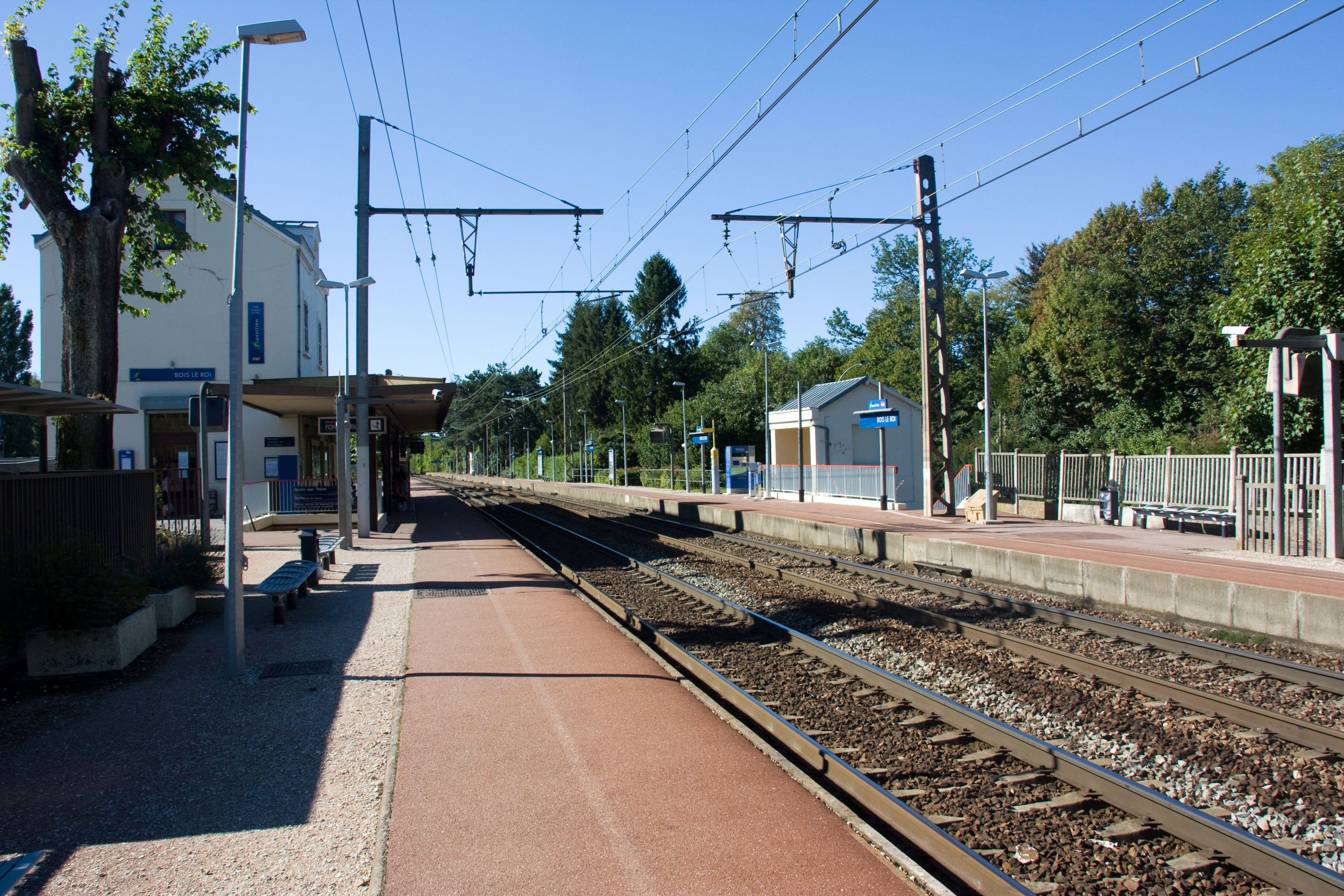 Gare de Bois-le-Roi, Bois-le-Roi, Seine-et-Marne, France